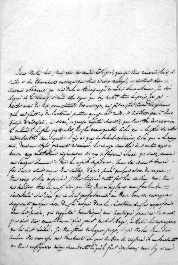 Письмо Амеде-Дэвида маркиза де Пасторе с обсуждением книги.